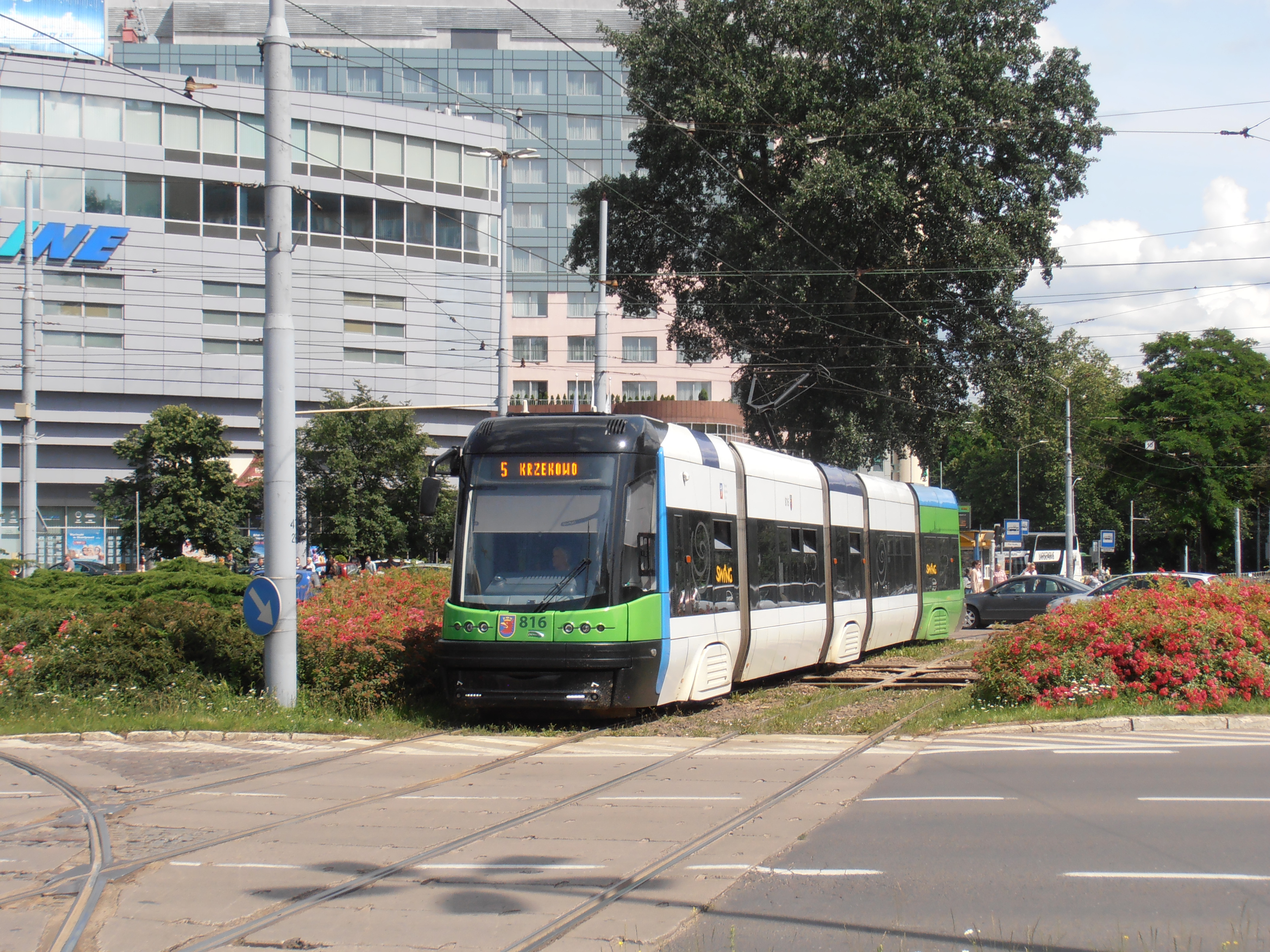 Pesa 120NaS2 w Szczeciniw, 2017 r.